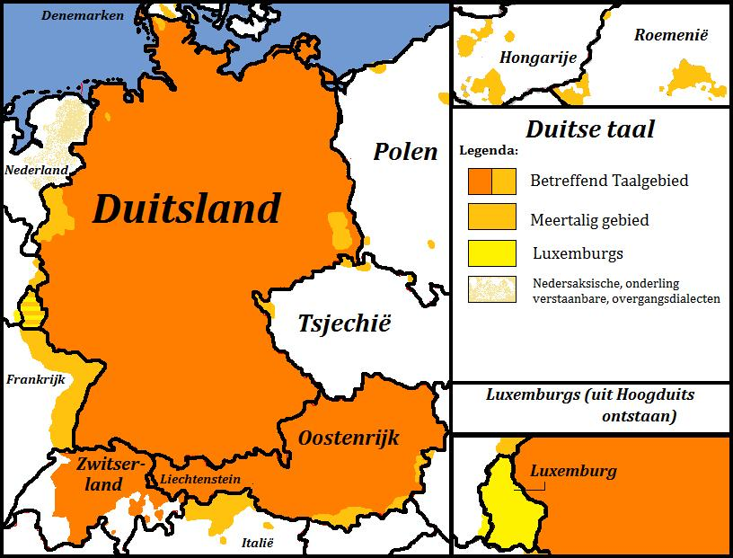 Status van de Duitse taal